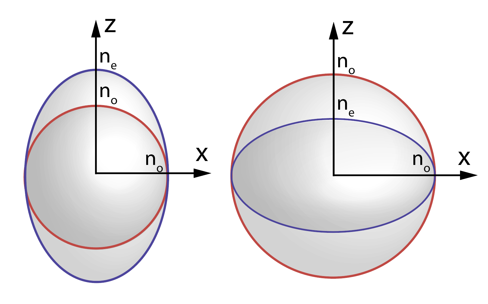 поверхности волновых векторов в одноосном кристалле